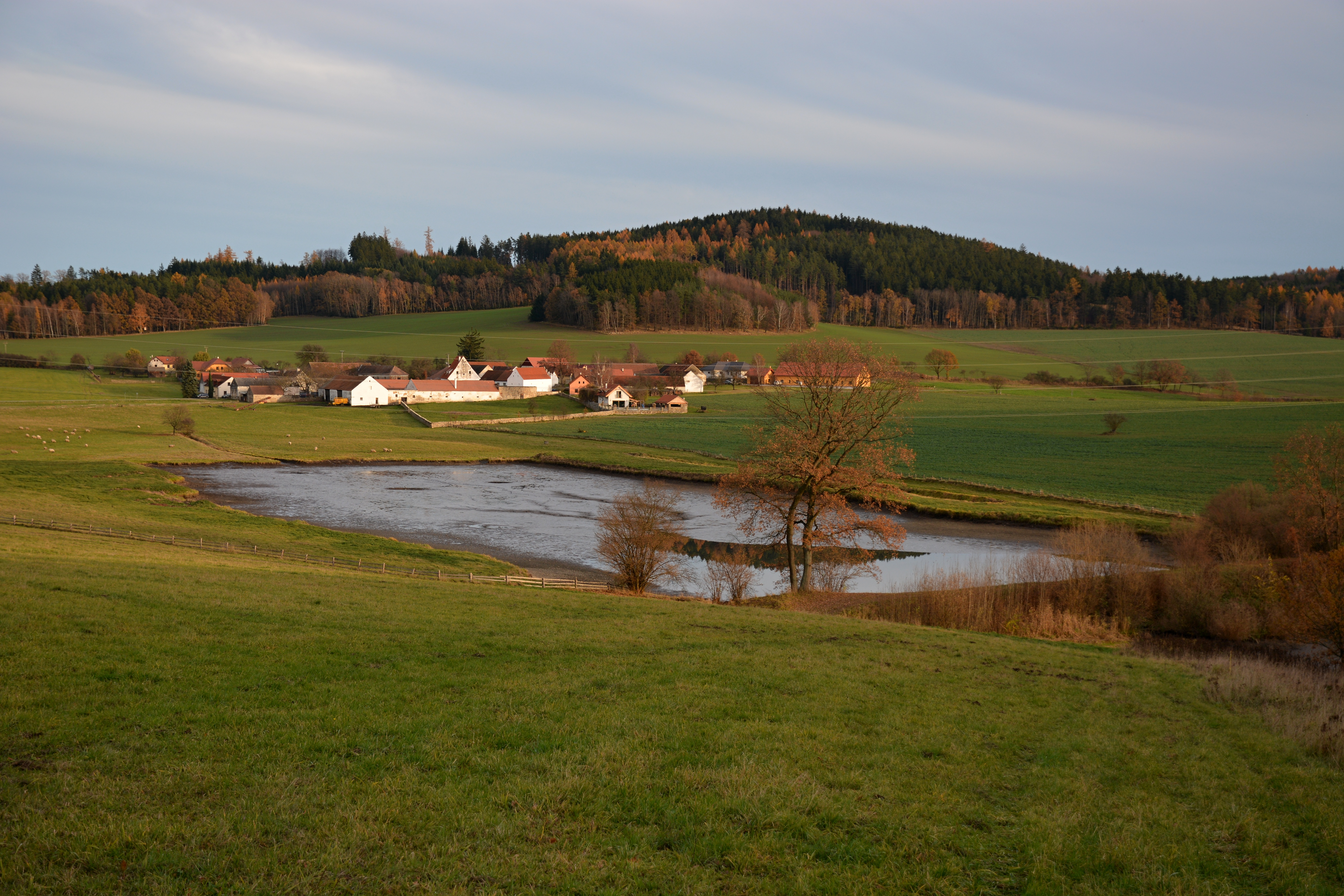 Obec Štěkře.